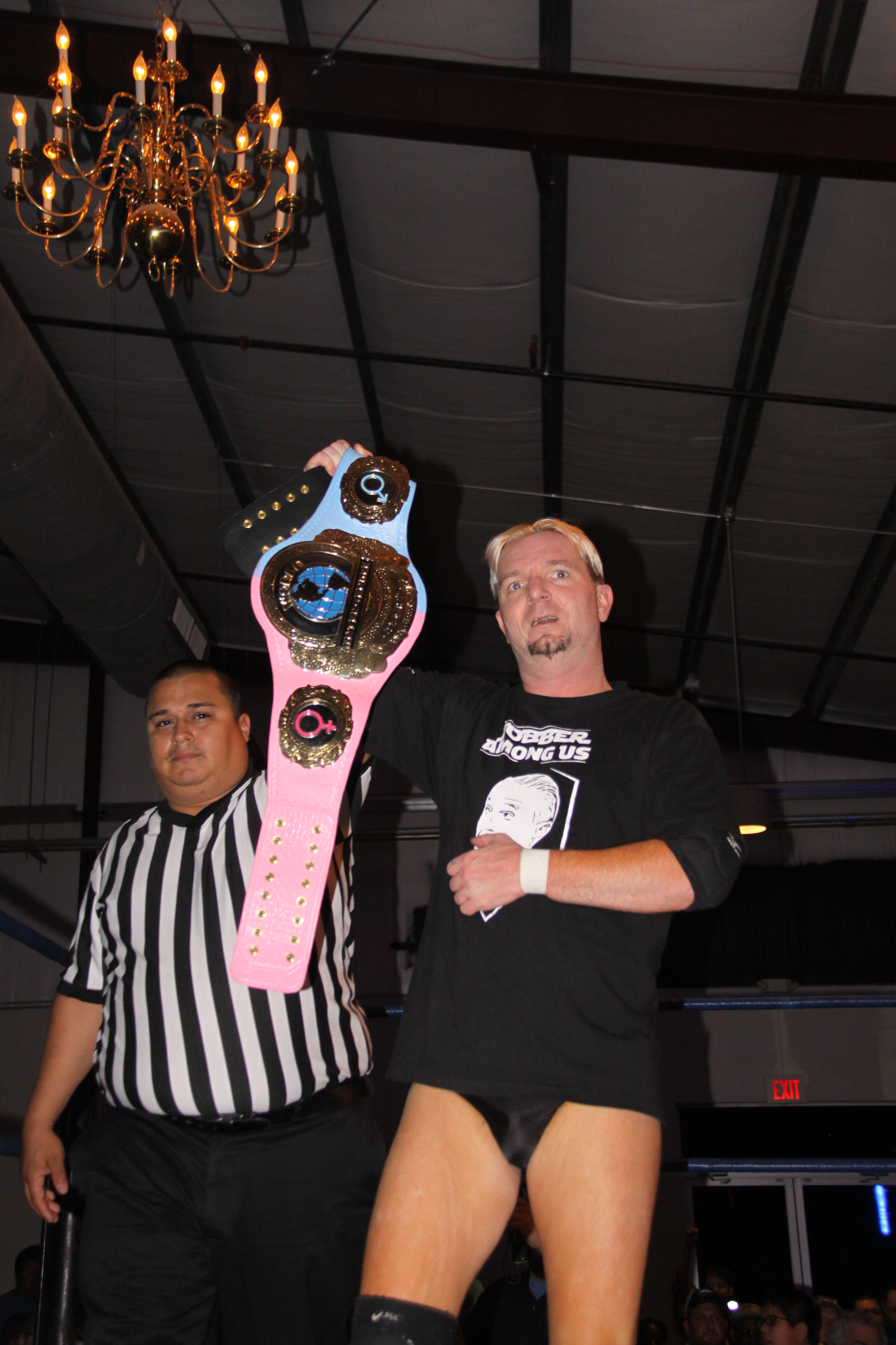 Le catcheur James Ellsworth brandissant la ceinture de champion intergenre.